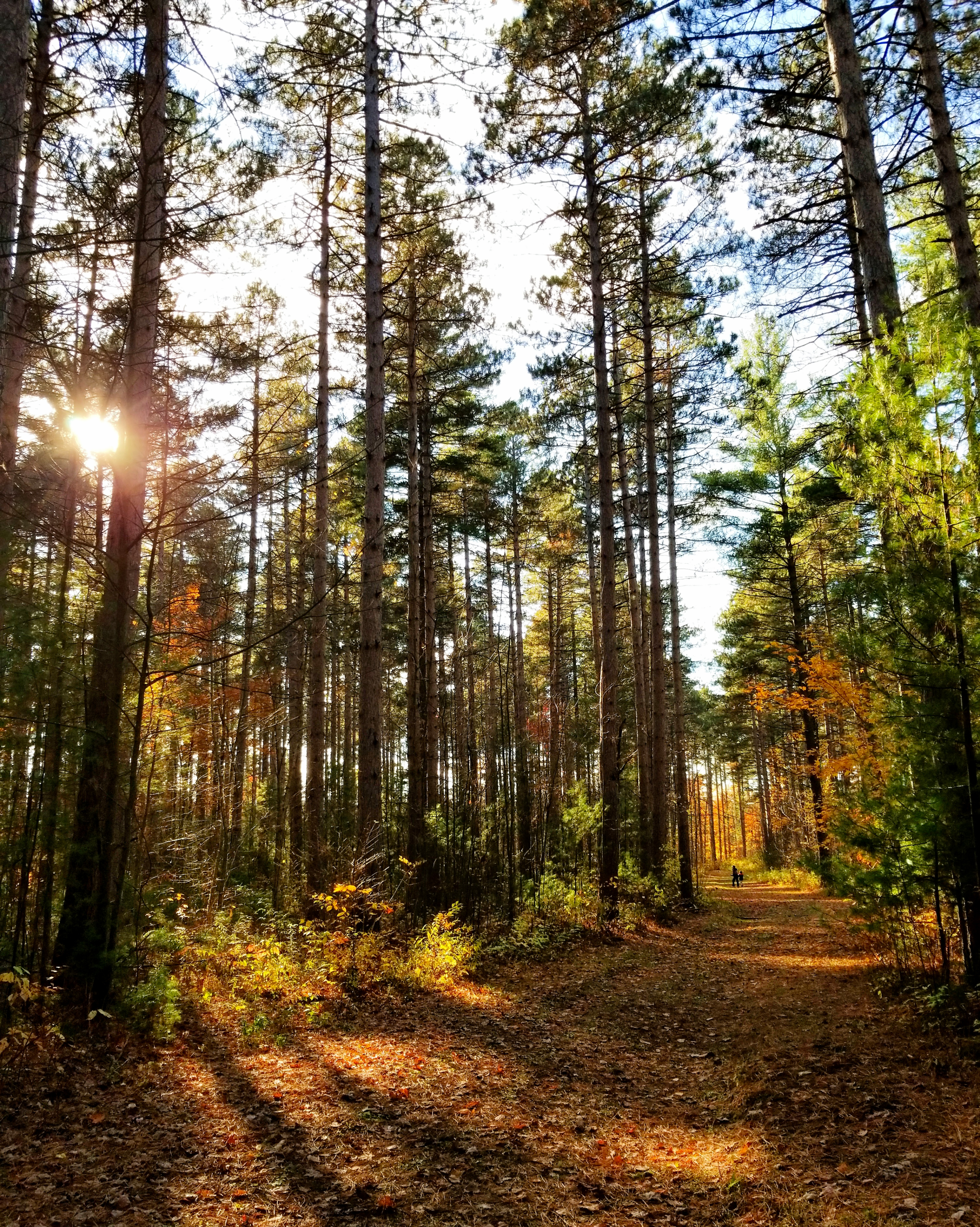 Larose Forest, Ontario, Canada